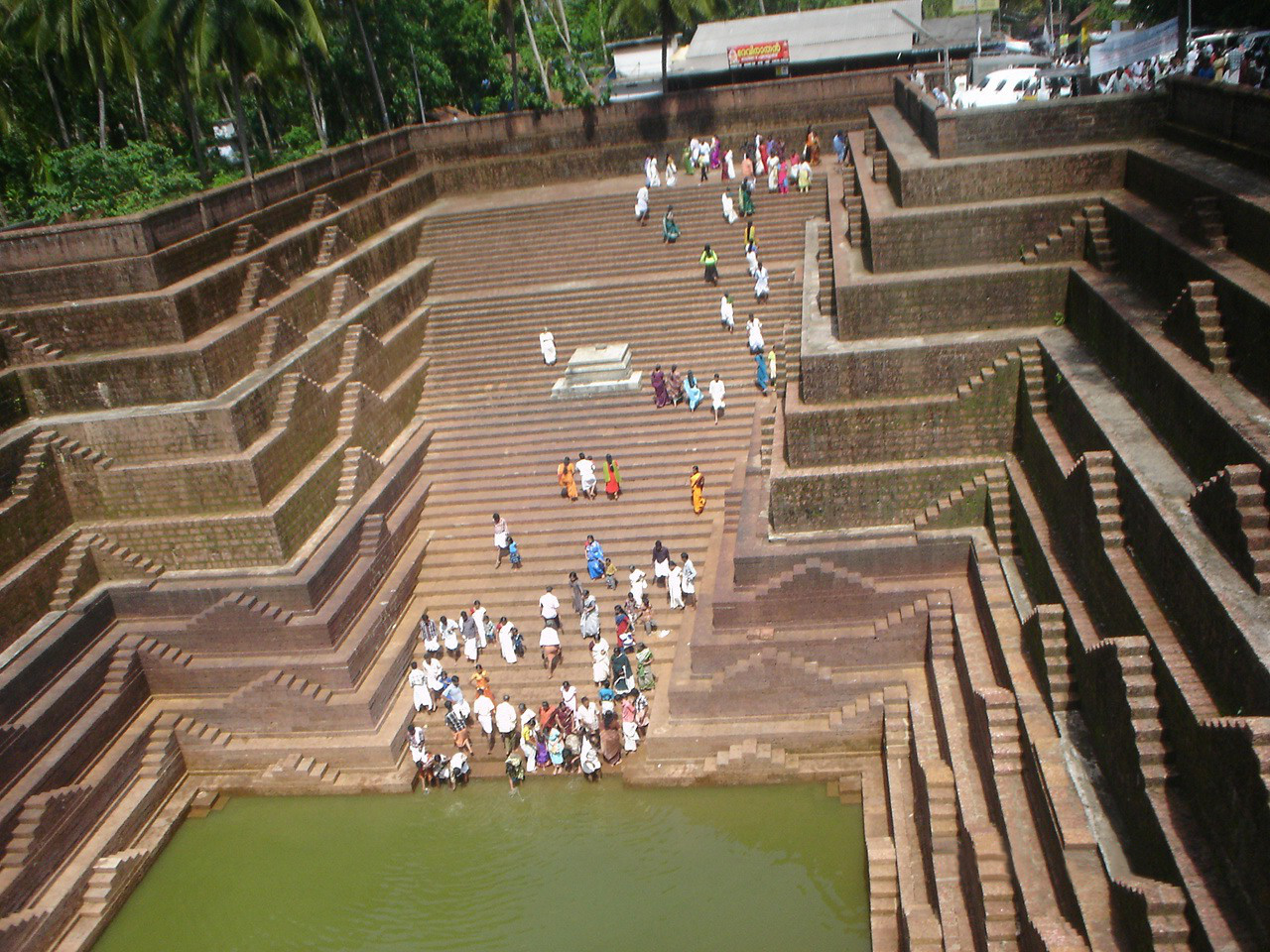 കണ്ണൂർ ജില്ലയിലെ പെരളശ്ശേരി ശ്രീ സുബ്രഹ്മണ്യസ്വാമി ക്ഷേത്രത്തിലെ കുളം